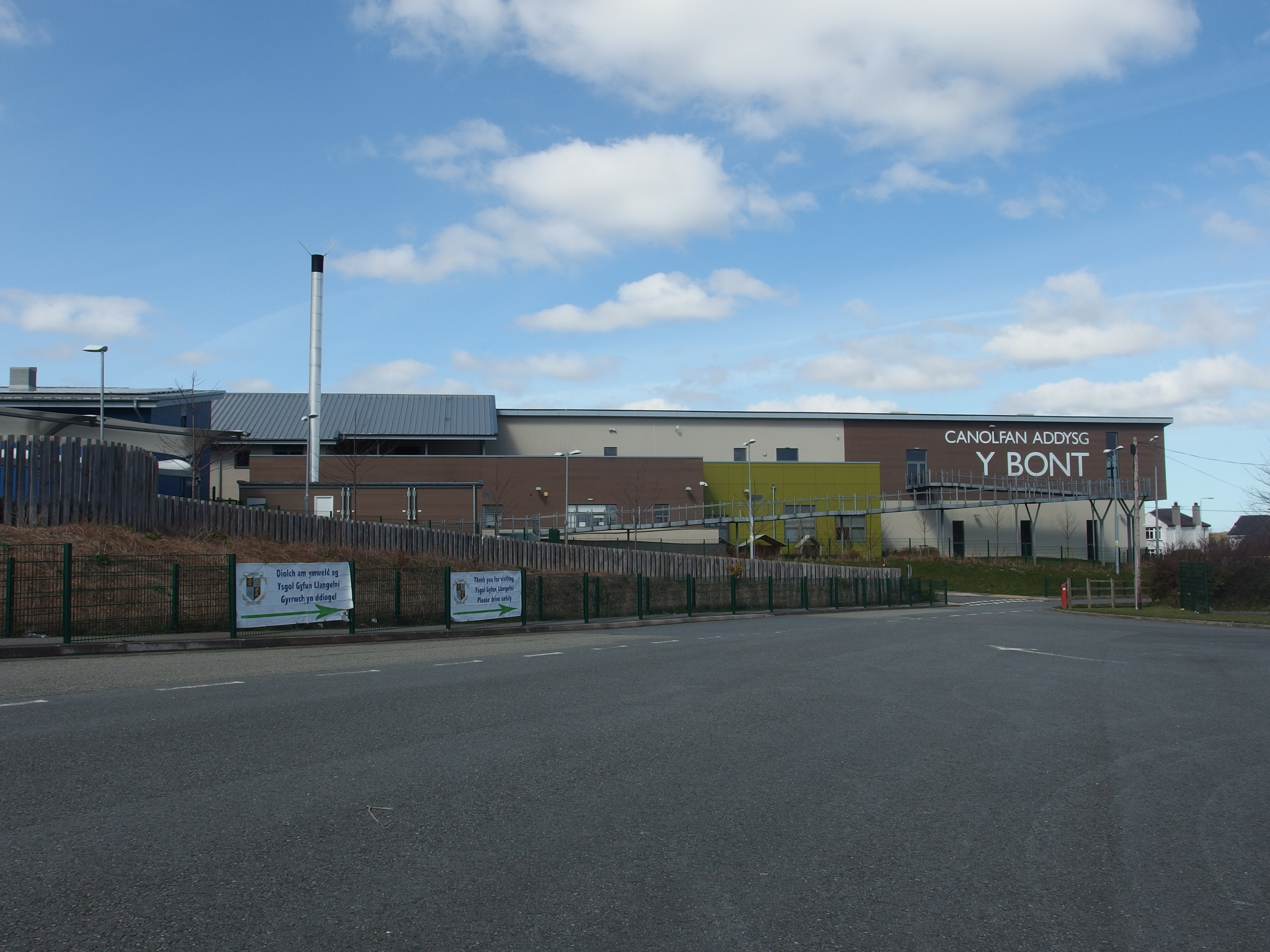 Llun o Ganolfan Addysg y Bont, Llangefni o iard Ysgol Gyfun Llangefni